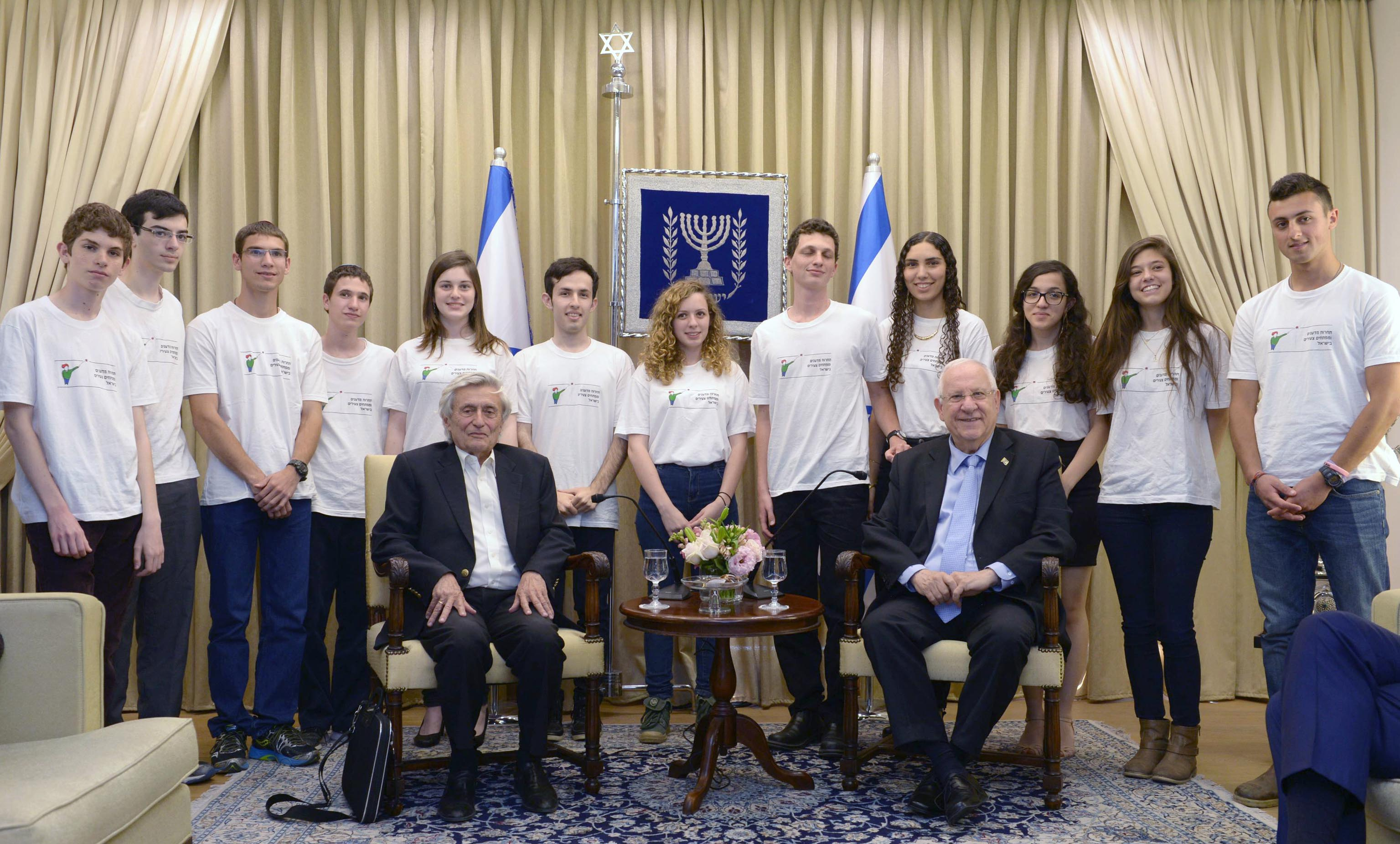 נשיא מדינת ישראל ראובן ריבלין ופרופ' חנוך גוטפרוינד בפגישה עם תלמידי תיכון שזכו בתחרות מדענים ומפתחים לשנת 2015